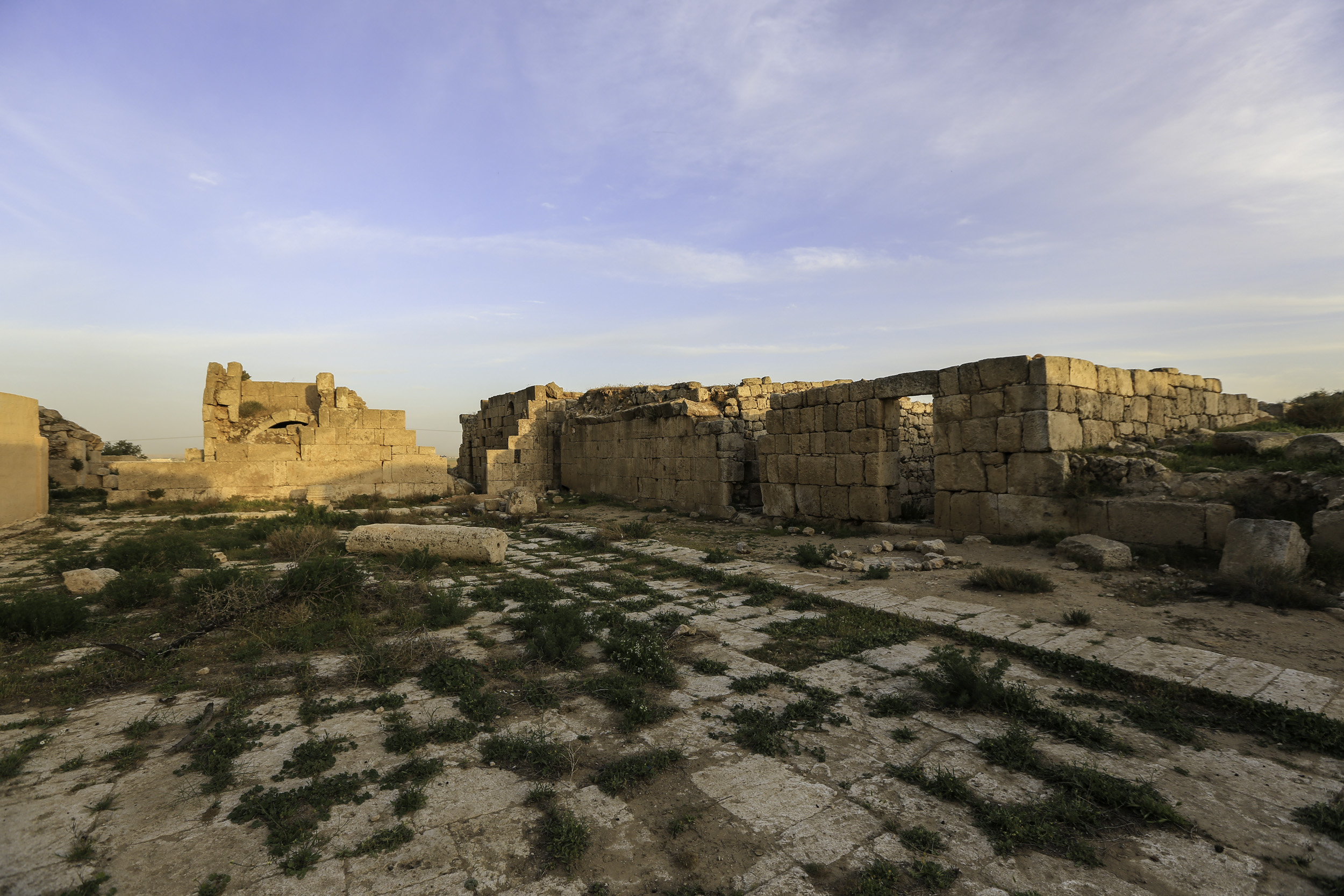 Al Qastal Castle (Interior)